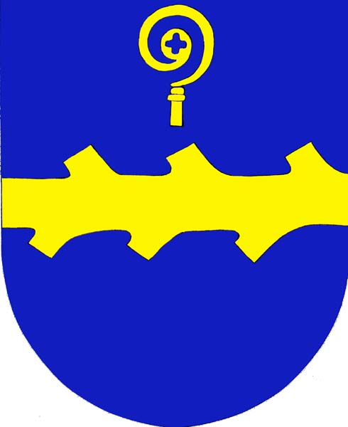 Znak obce Provodov-Šonov